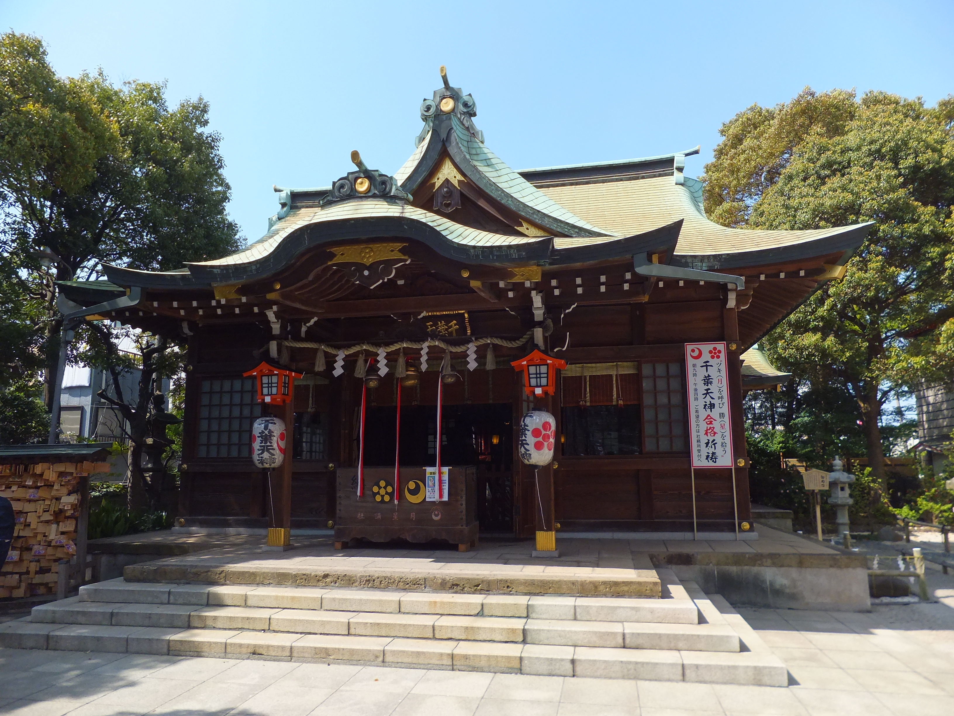 千葉神社摂社、千葉天神